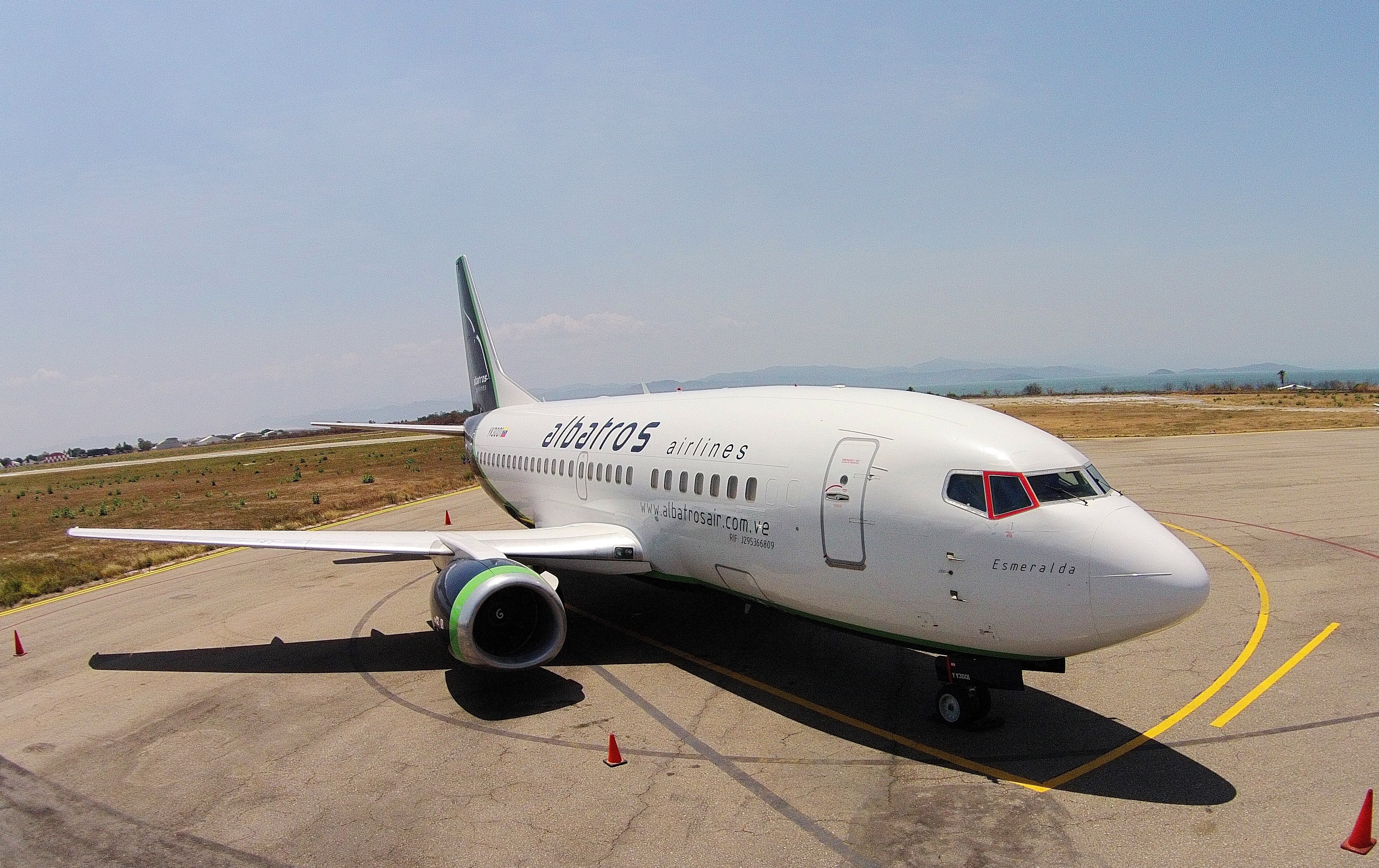 Boeing 737-500 Albatros Airlines Venezuela YV3001